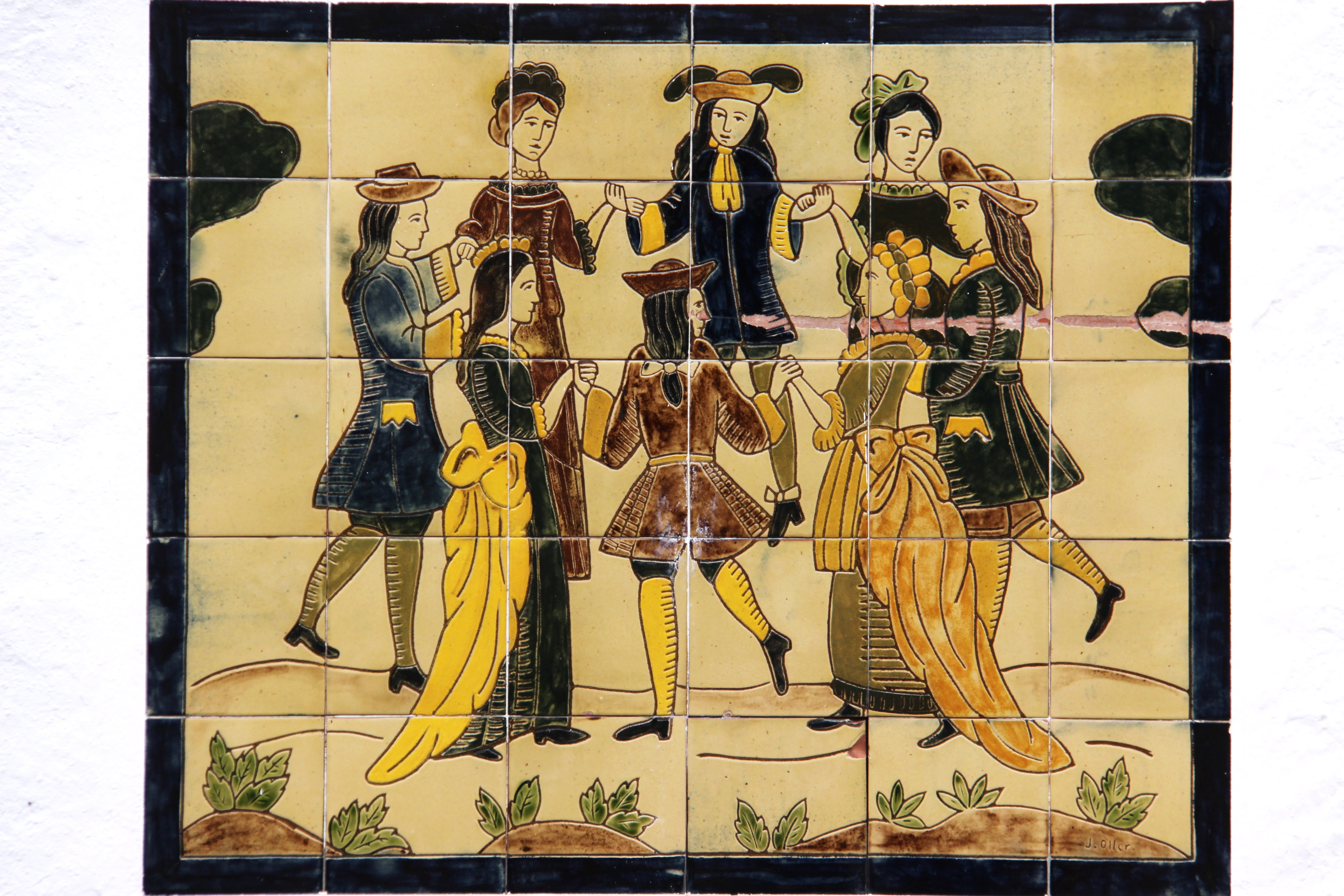 Une plaque de façade de maison représentant une sardane dansée par huit personnnes (quatre danseurs et quatre danseuses). Cette plaque décorative en céramique est constituée par 30 carreaux. Elle a été détériorée au niveau de la seconde rangée de carreaux vers le haut à droite (trainée rouge). La sardane est la danse nationale catalane. Cadaqués, Alt Empordà, Catalogne, Espagne